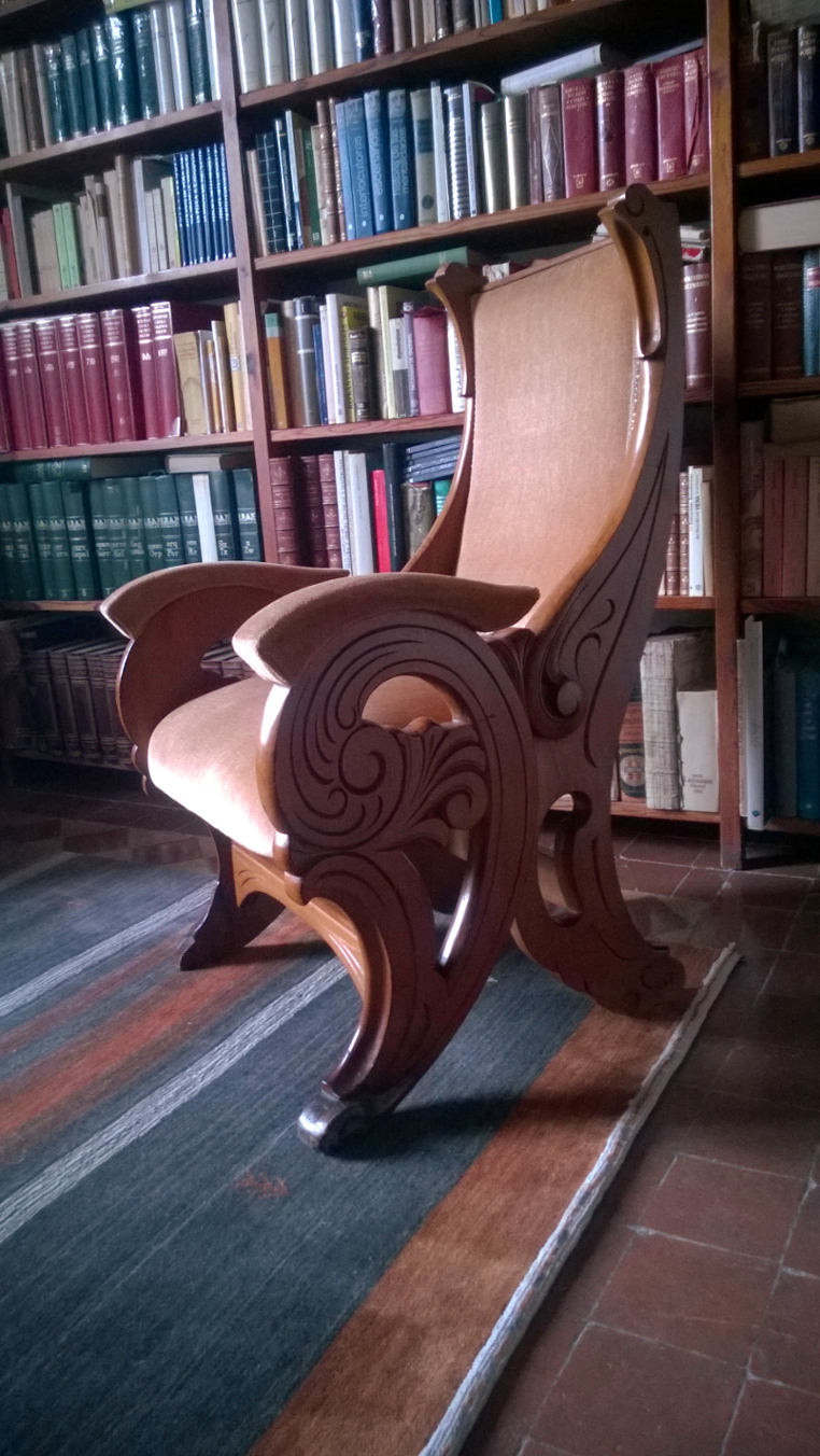 Silla de Modest Feu